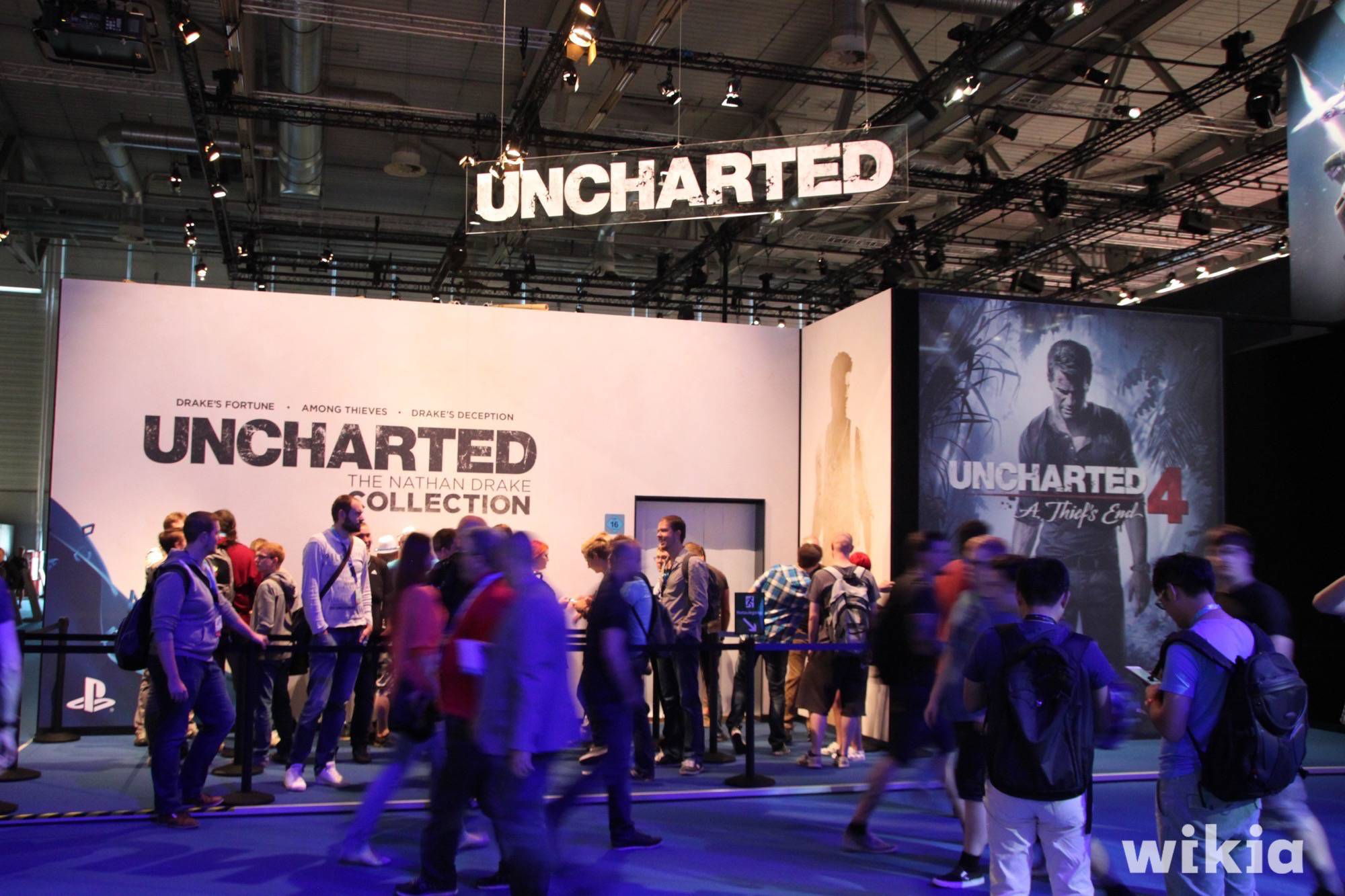 Impressionen: Erster Tag, Mittwoch. Gamescom 2015 impressions